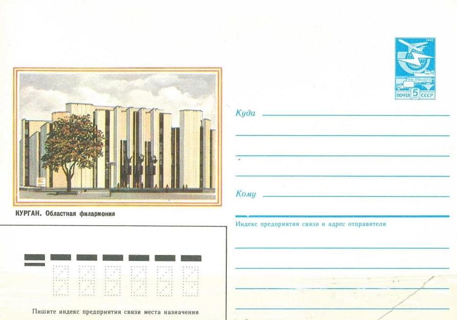 Курганская областная филармония, почтовый конверт